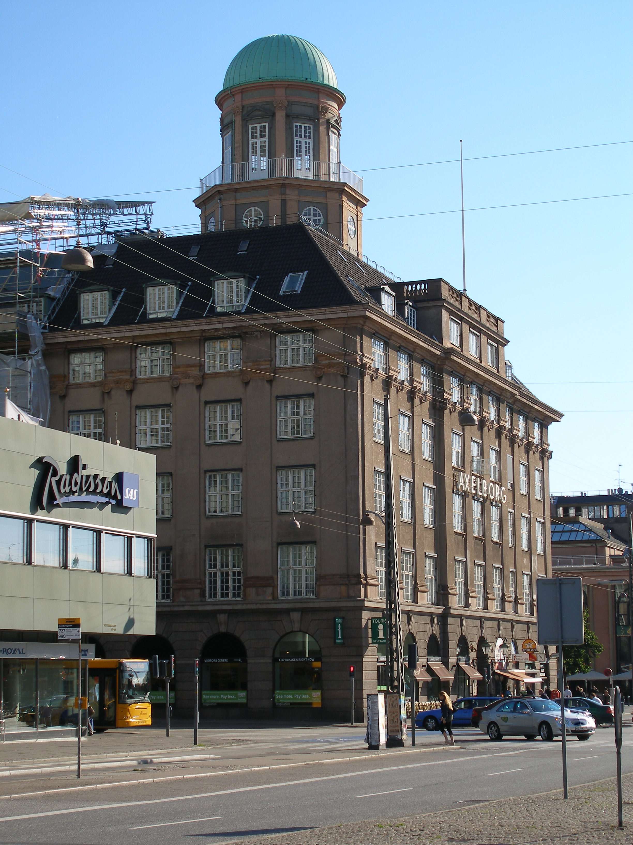 Axelborg, hovedsæde for Danske Slagterier, Vesterbrogade, København